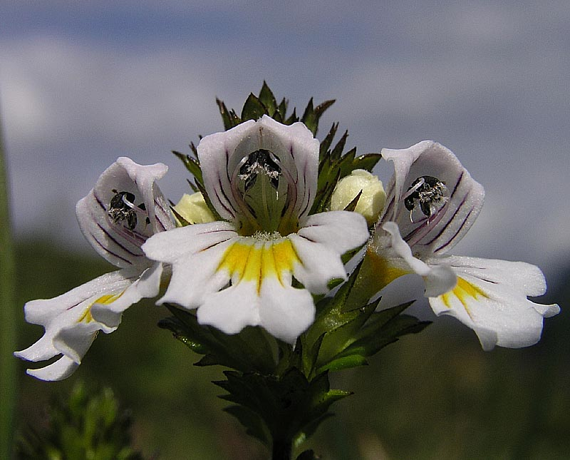 Wiesen-Augentrost (euphrasia rostkoviana), aufgenommen im Kaisergebirge (Österreich)